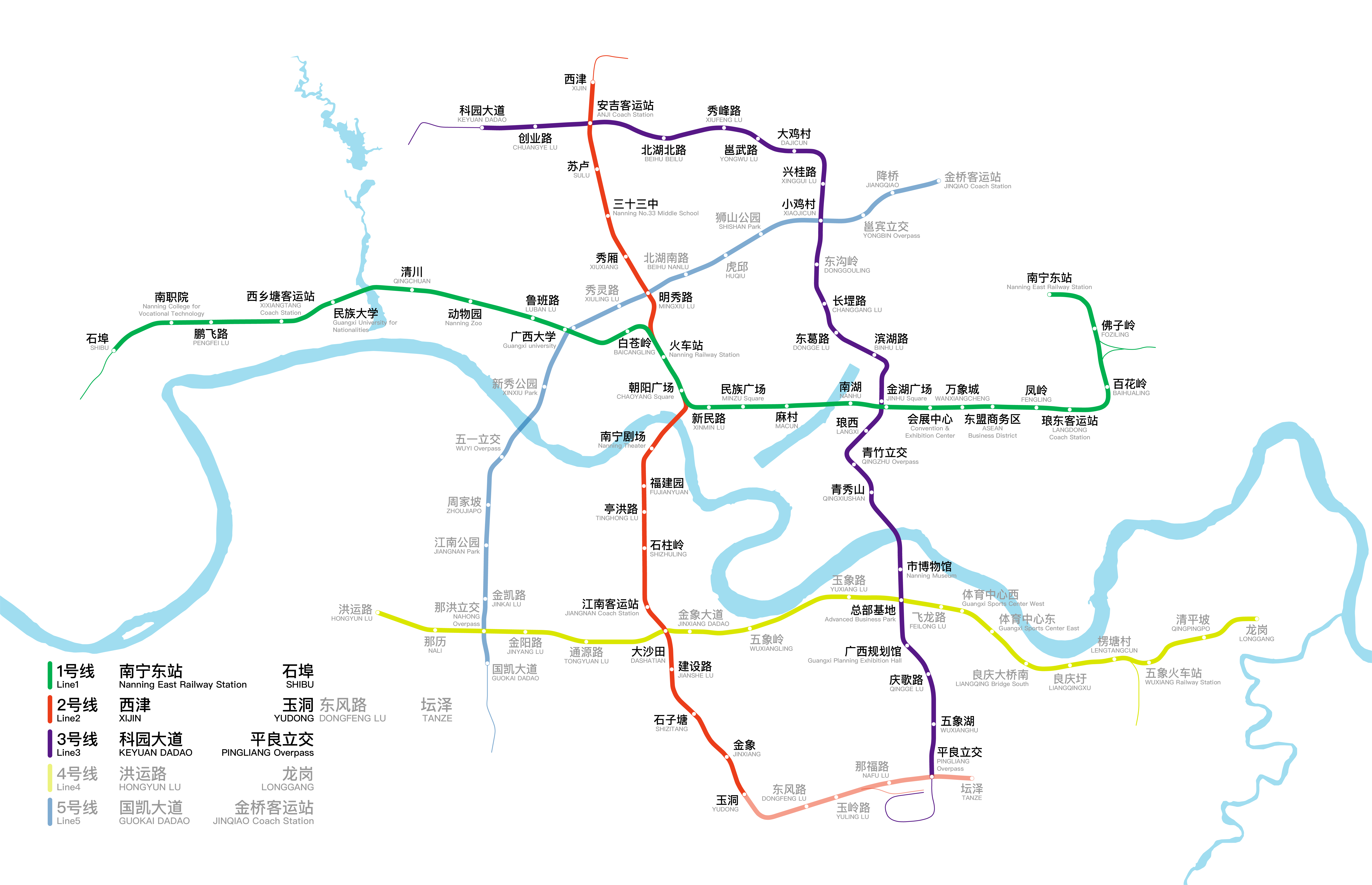 中文（中国大陆）: 南宁轨道交通规划线路图，更新于2018年6月